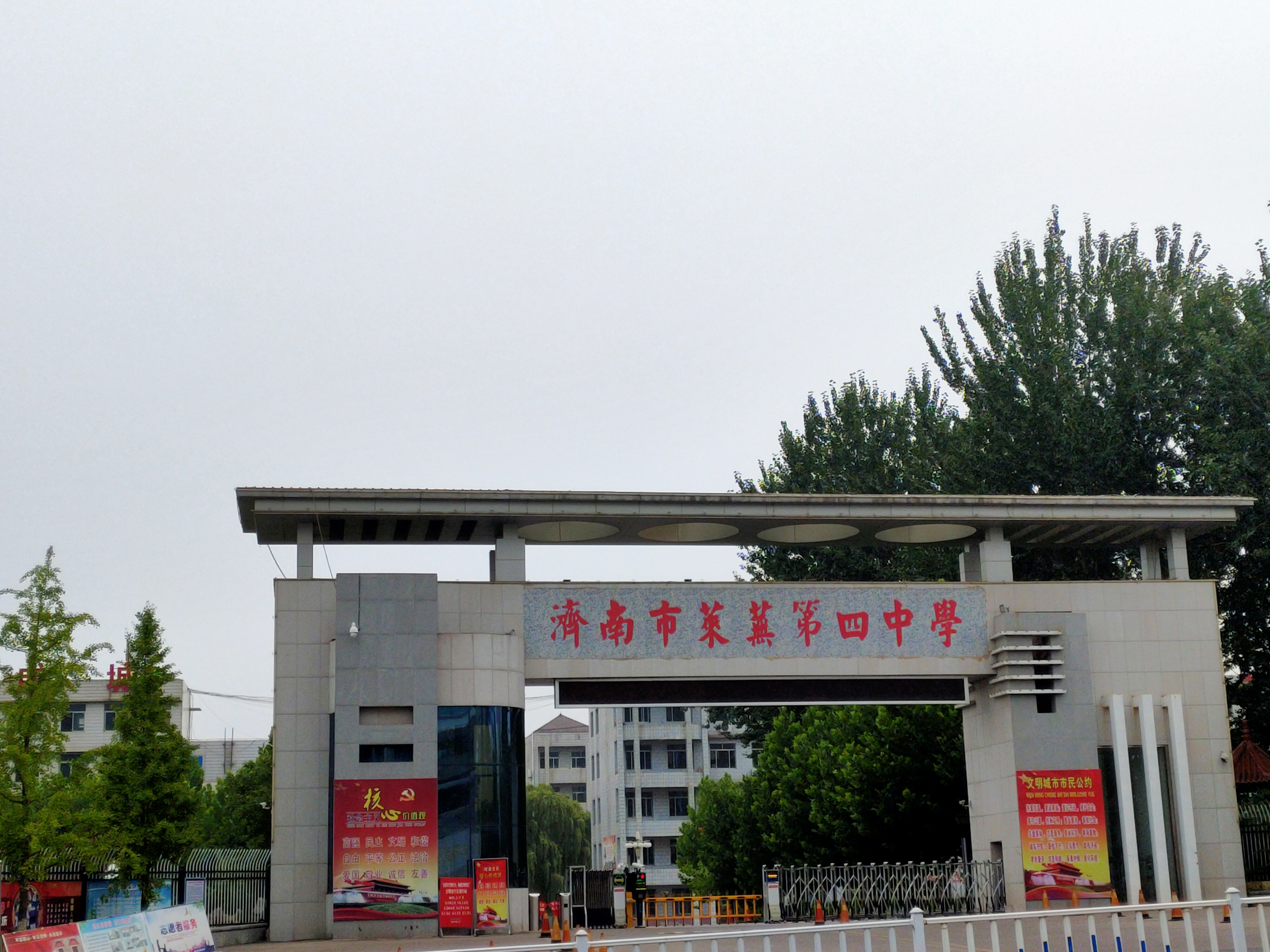 济南市莱芜第四中学南门